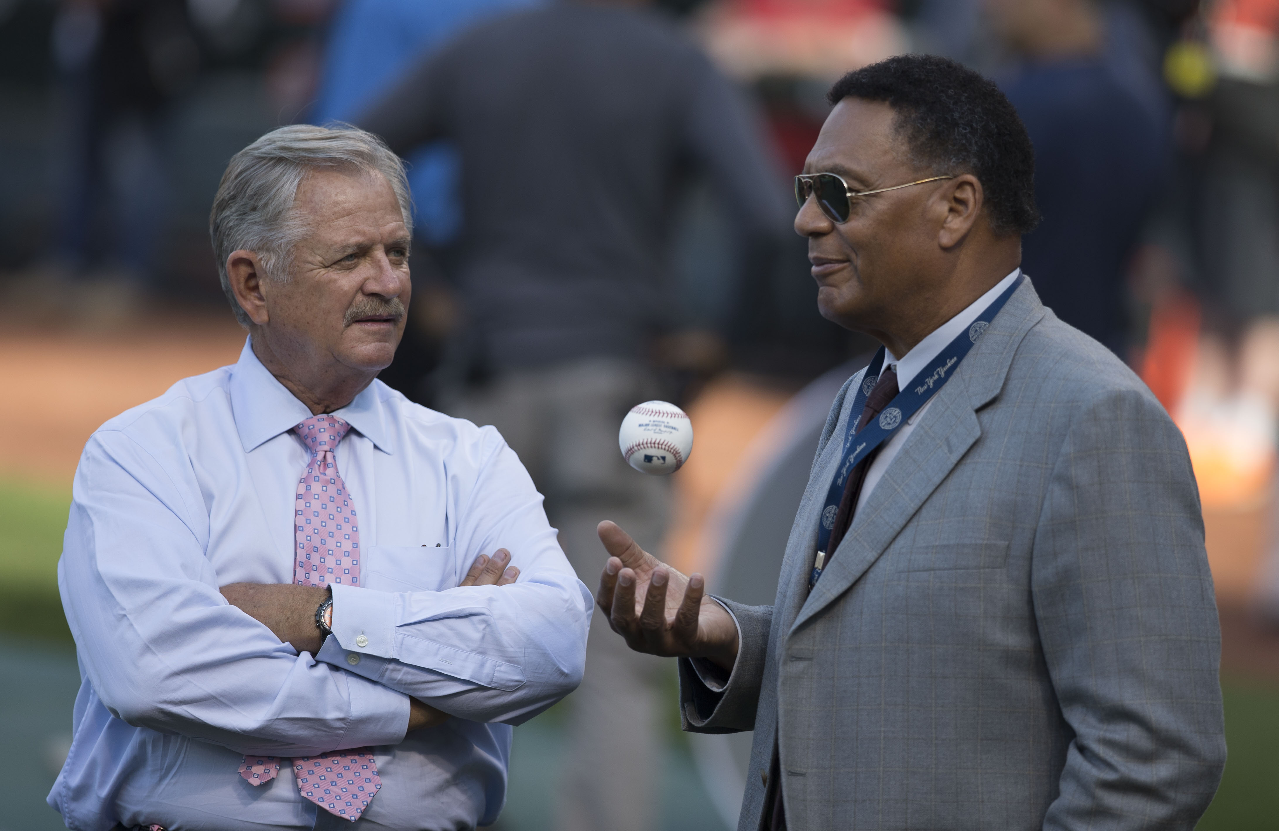 Yankees at Orioles 04/13/15